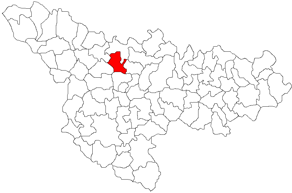 Sanandrei, Timis Licensing Categorie:Hărţi ale judeţului Timiş